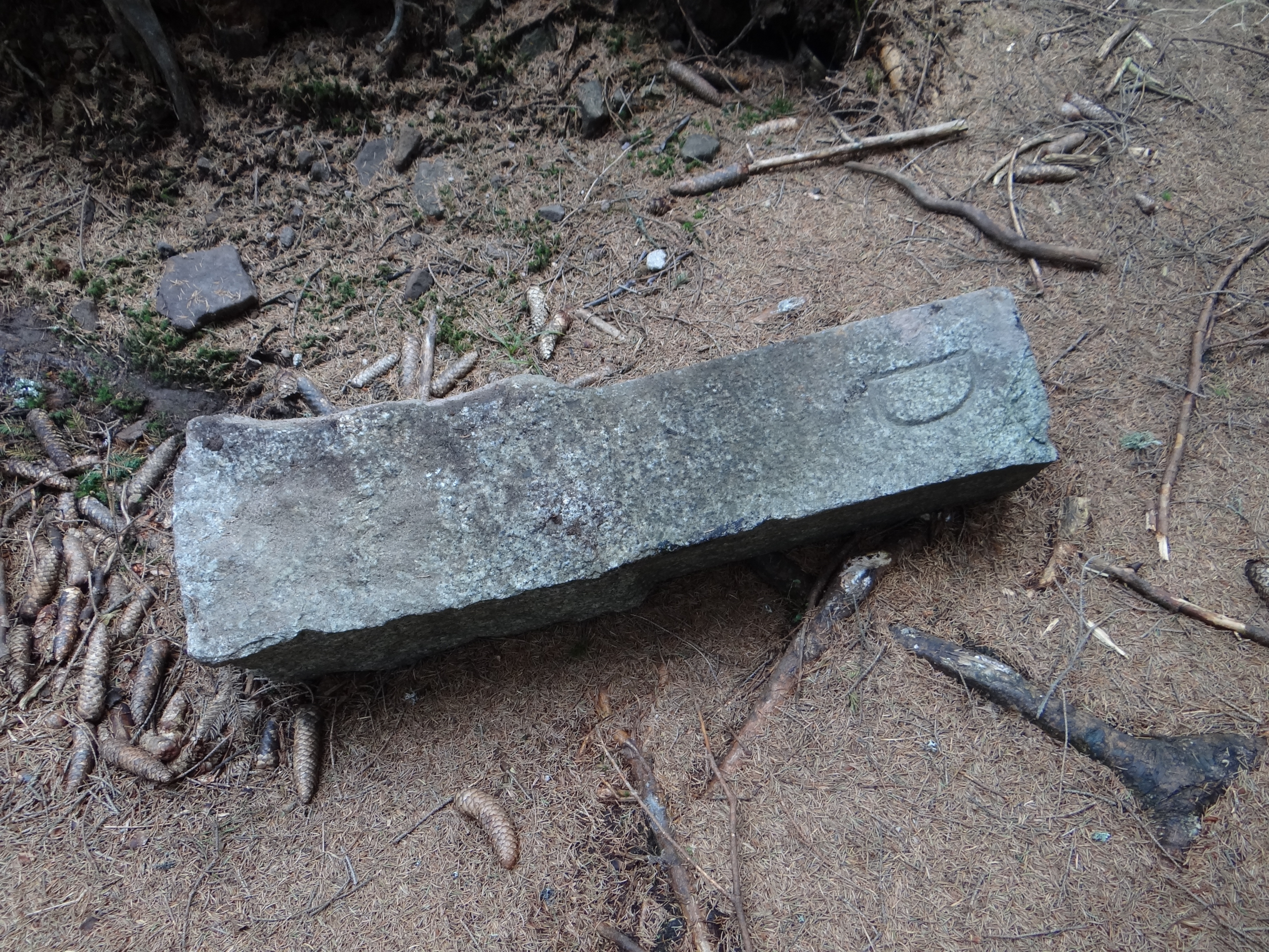 Słupek granicy słowacko-niemieckiej w okresie II wojny światowej na Czyrńcu